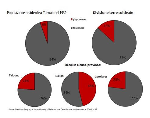 grafico su terre coltivate a Taiwan